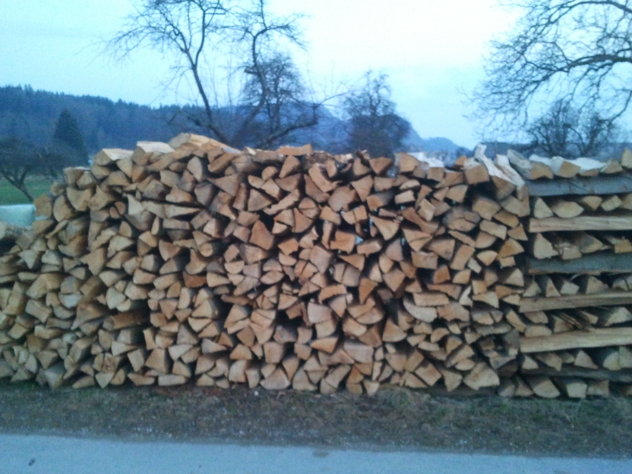 Les osnova za Biomaso.